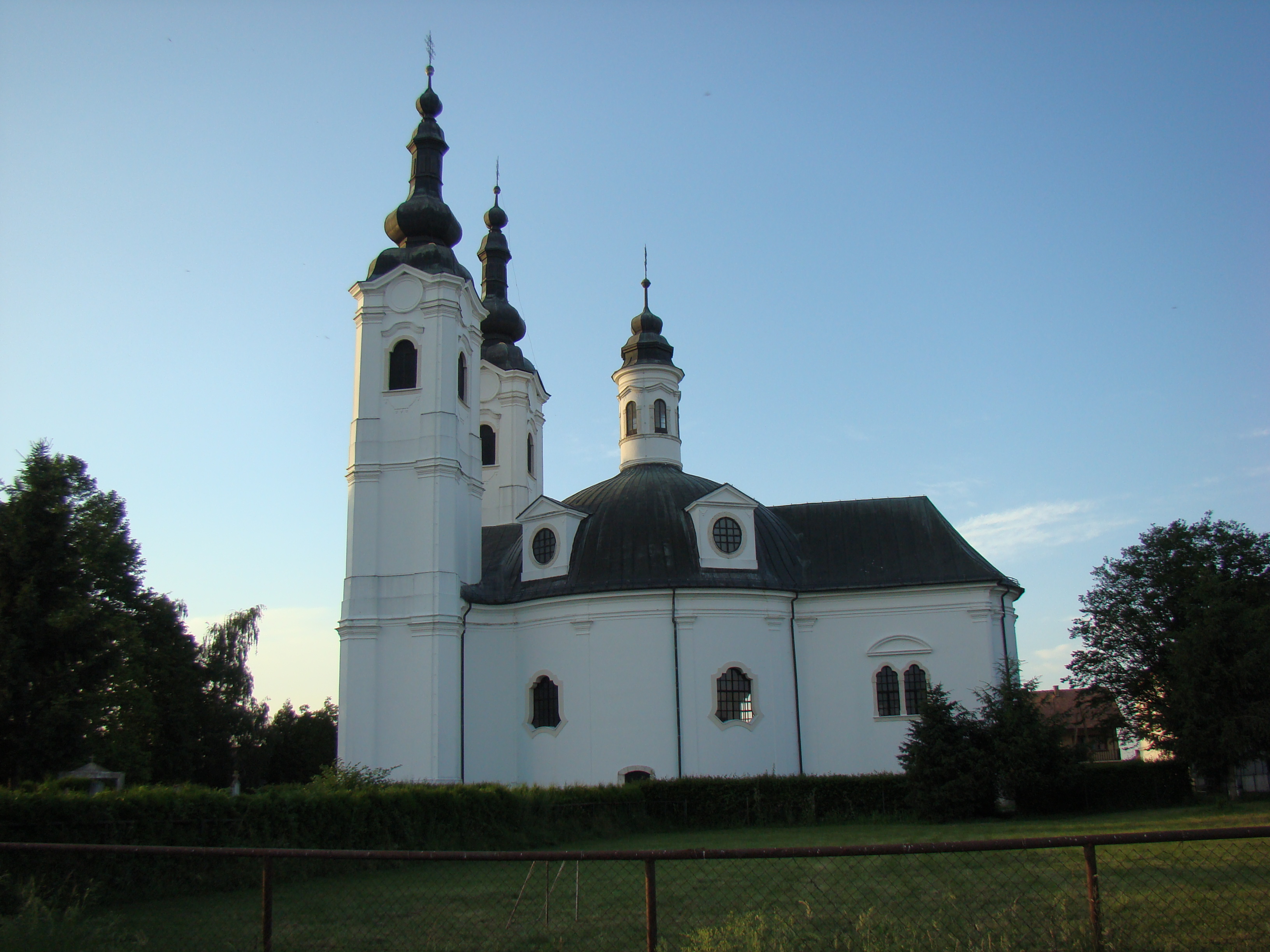 Sela Crkva Sv. Marije Magdalene